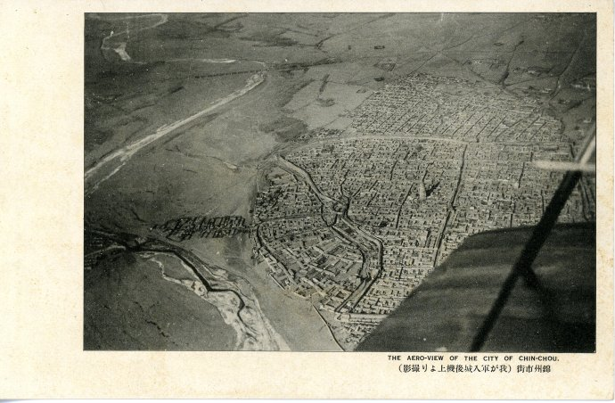 1931年9月18日事变后日军进占锦州的历史影像，出自1932年日本和歌山大正写真工艺所出版明信片《锦州方面活跃的皇军的威力》